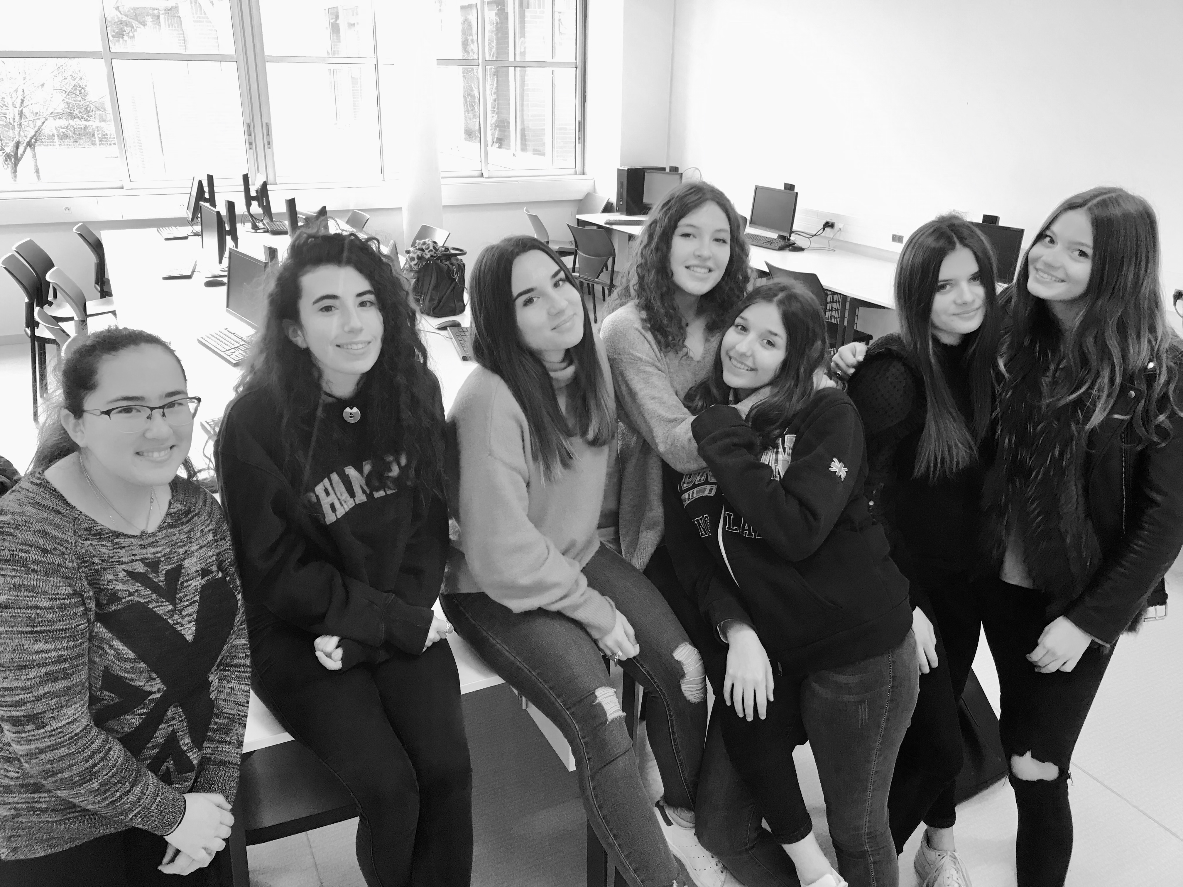 En partenariat avec l'ISAE de Toulouse, des élèves de scondes ont contribué sur wikipédia en vue de valoriser les femmes scientifiques.